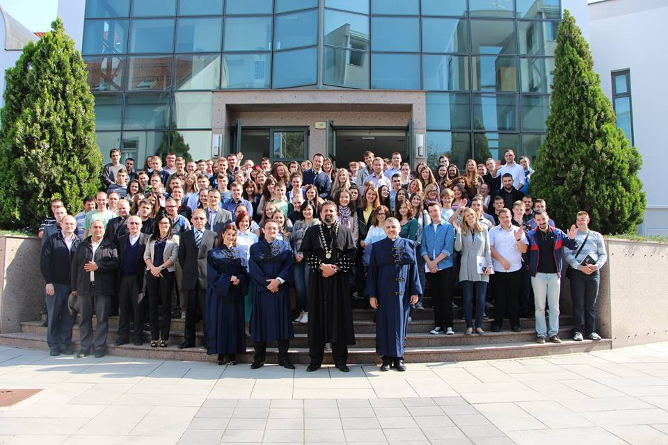 Svi